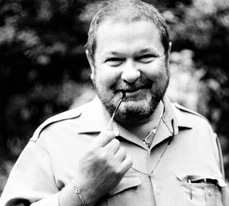 Юлиан Семенов